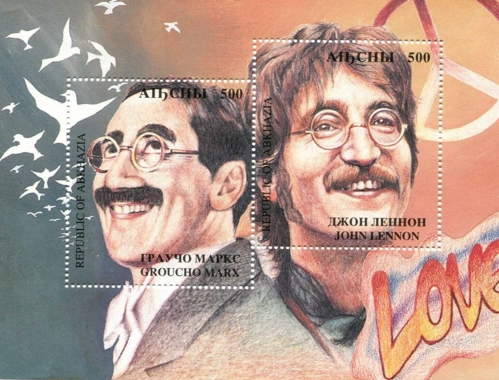 Marx-Lennon Abkhazia stamp